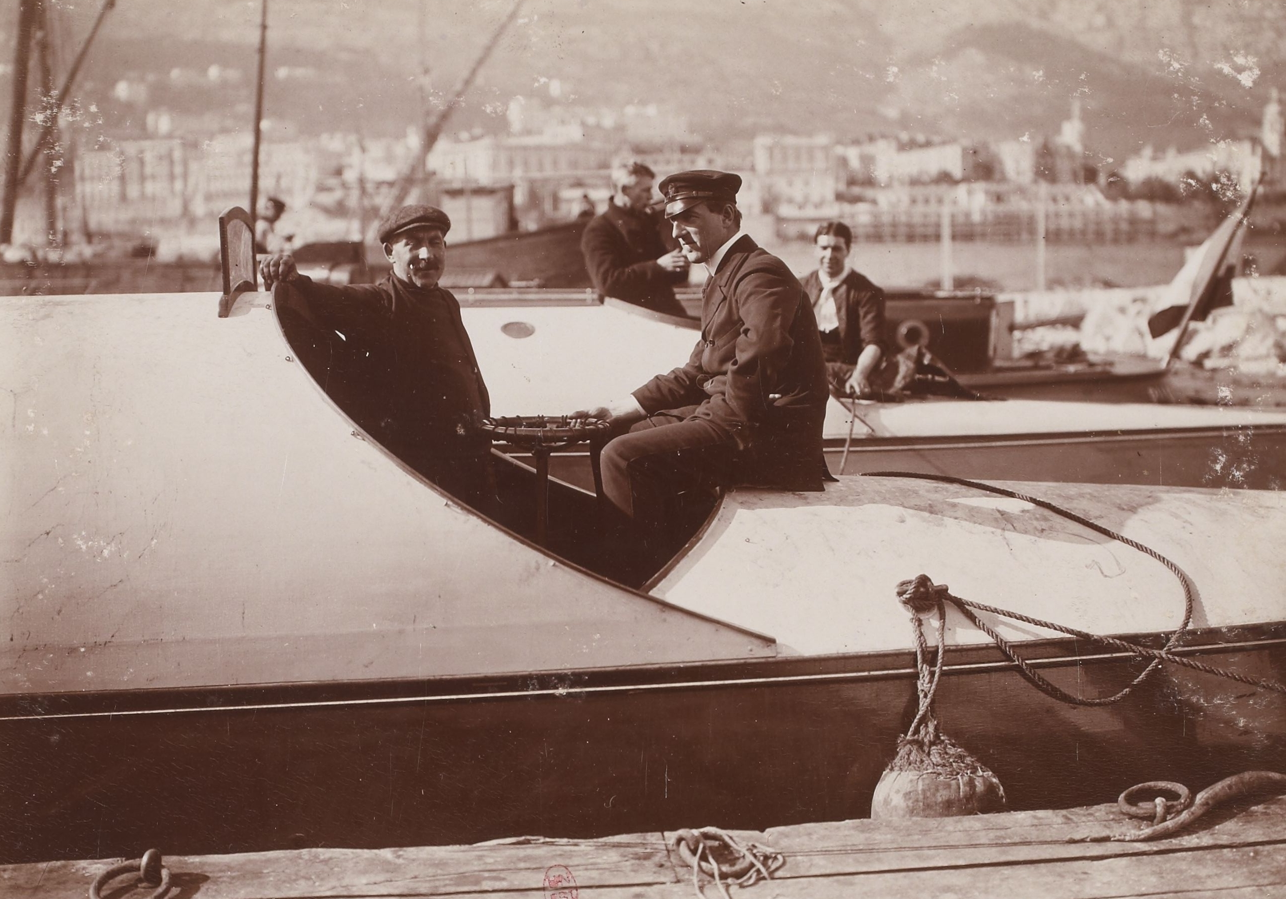 [Collection Jules Beau. Photographie sportive] : T. 33. Années 1906 et 1907 / Jules Beau : F. 36. [Meeting de Monaco]; [canots automobiles] Lord Howard de Walden à bord du Daimler II. Ce racer de 2e série est muni de deux moteurs six cylindres et de deux hélices.